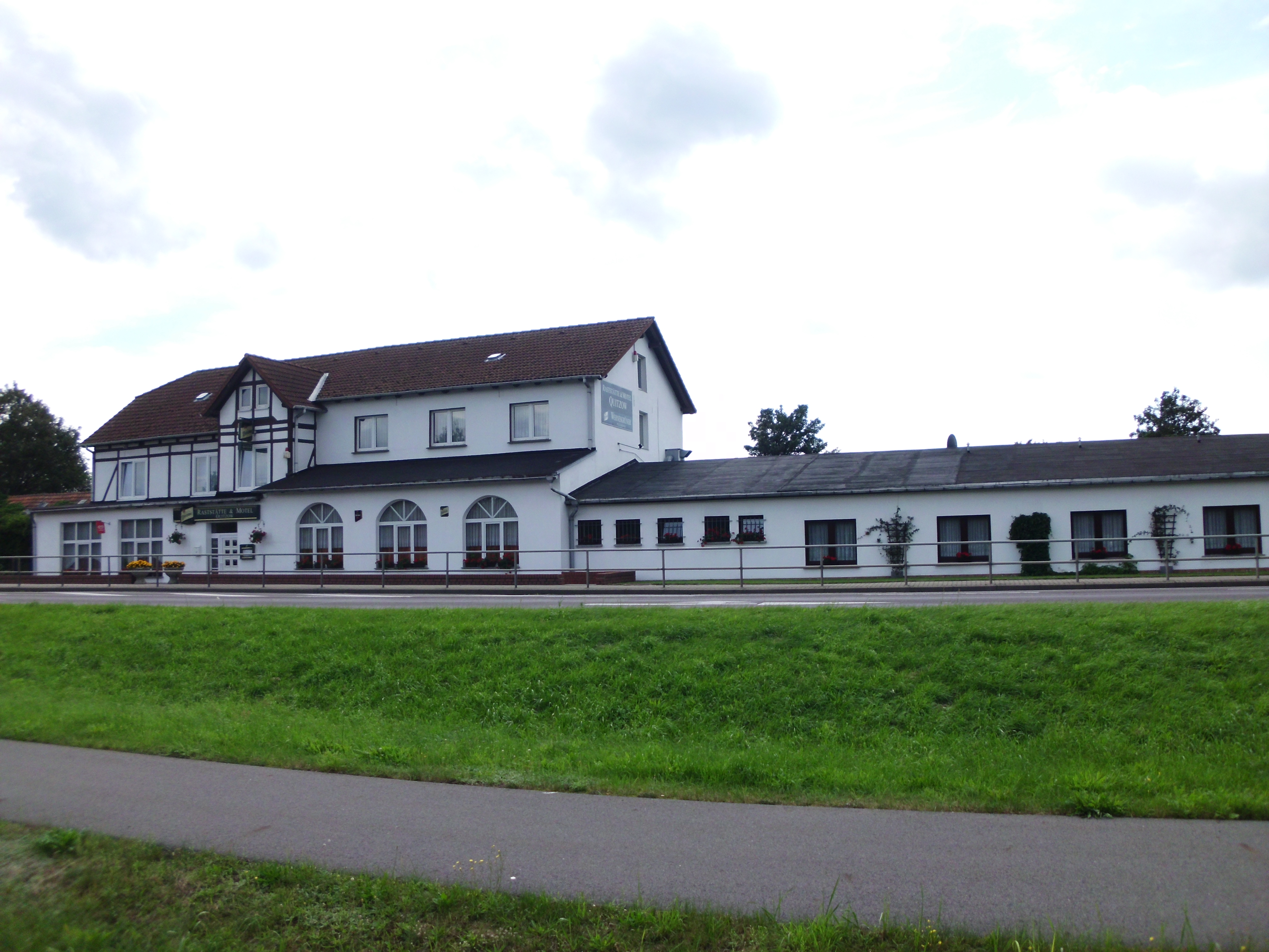 Raststätte und Motel in Quitzow